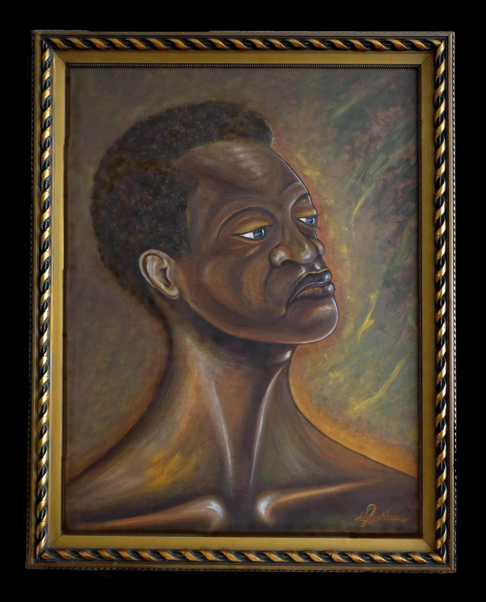 Dit werd voor het eerst geëxposeerd 2012-11-25